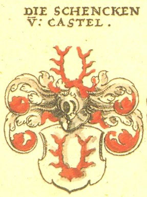 Ritterschaft und Adel in der Schweiz Schenk von Castell